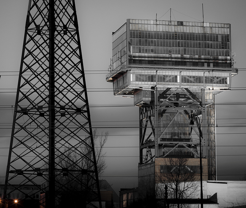 Důl Jeremenko Ostrava Vítkovice